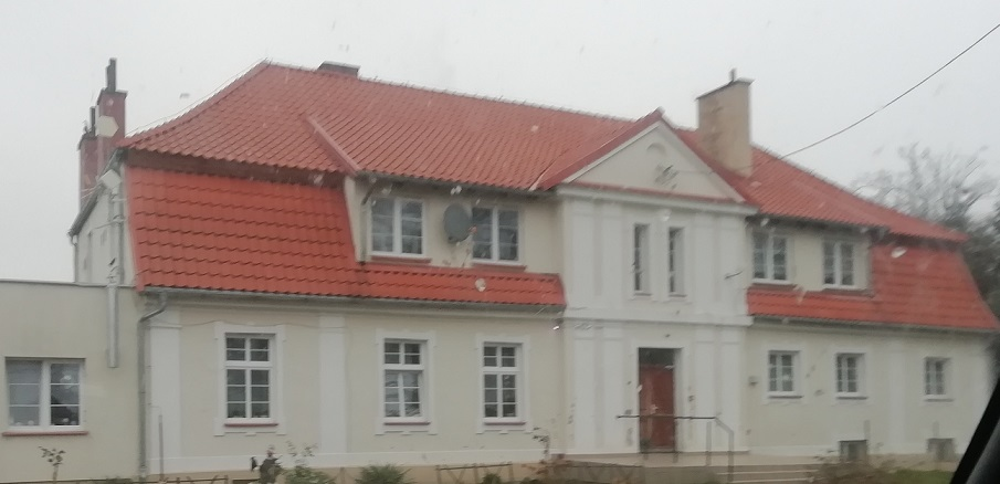 Dwór w Klecewie (woj. pomorskie)